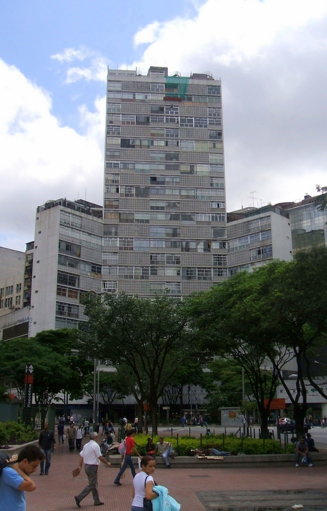 Edifício Eiffel, projeto de Oscar Niemeyer (1953); Praça da República, centro da cidade de São Paulo, Brasil.